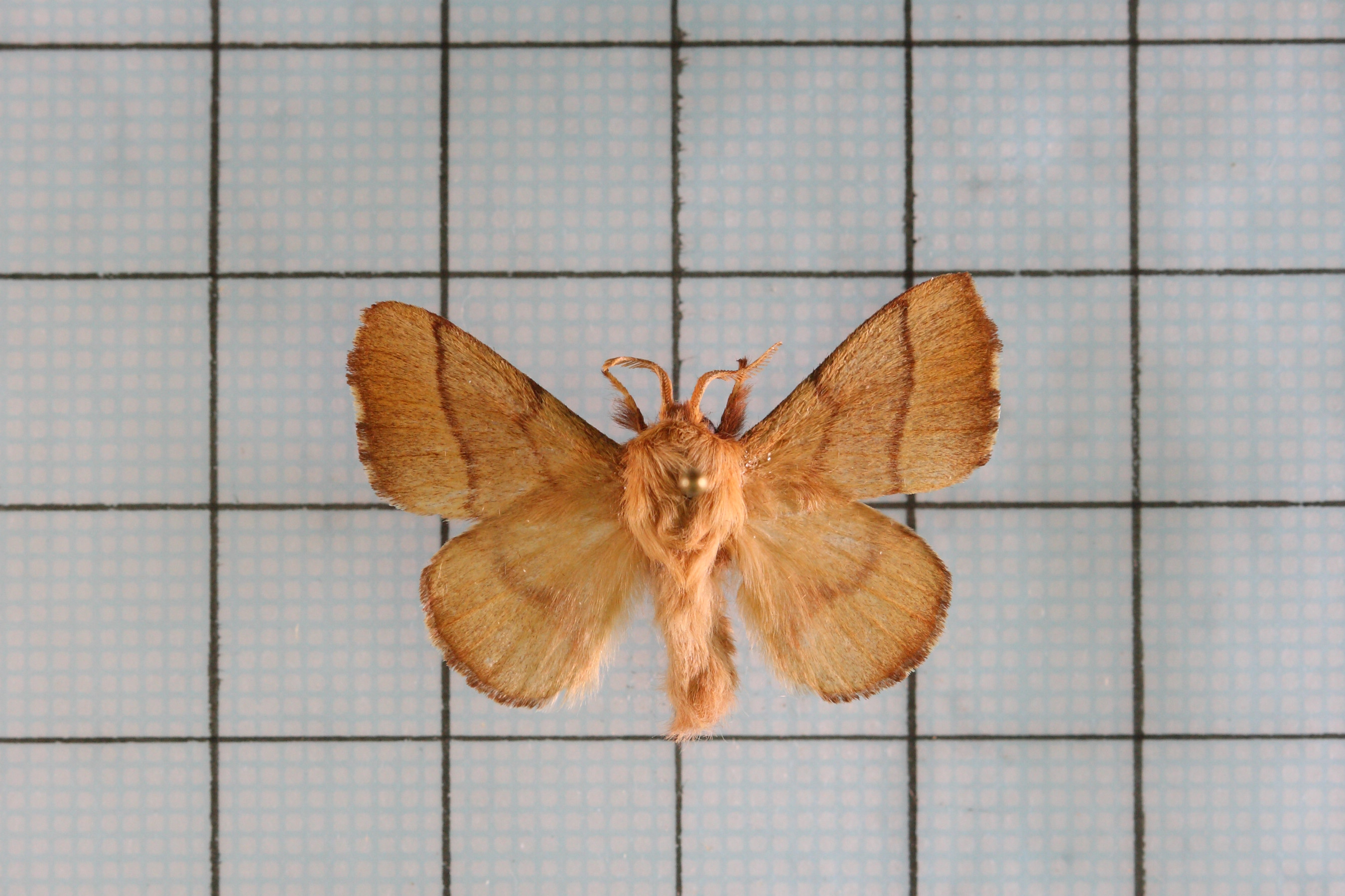 Malacosoma neustria formosana Matsumura, 1932 天幕枯葉蛾 認識台灣的昆蟲9:167